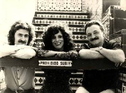 El músico Alberto Favero pianista (izquierda), Nacha Guevara (centro) y el poeta Mario Benedetti (derecha).